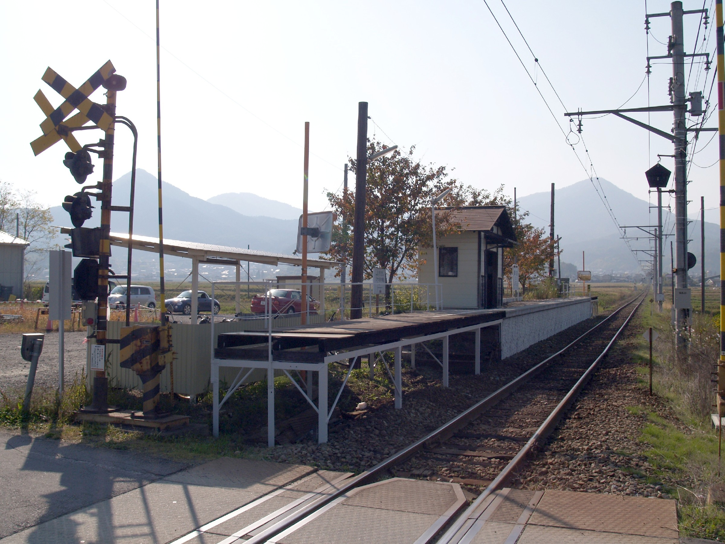 舞田駅ホーム